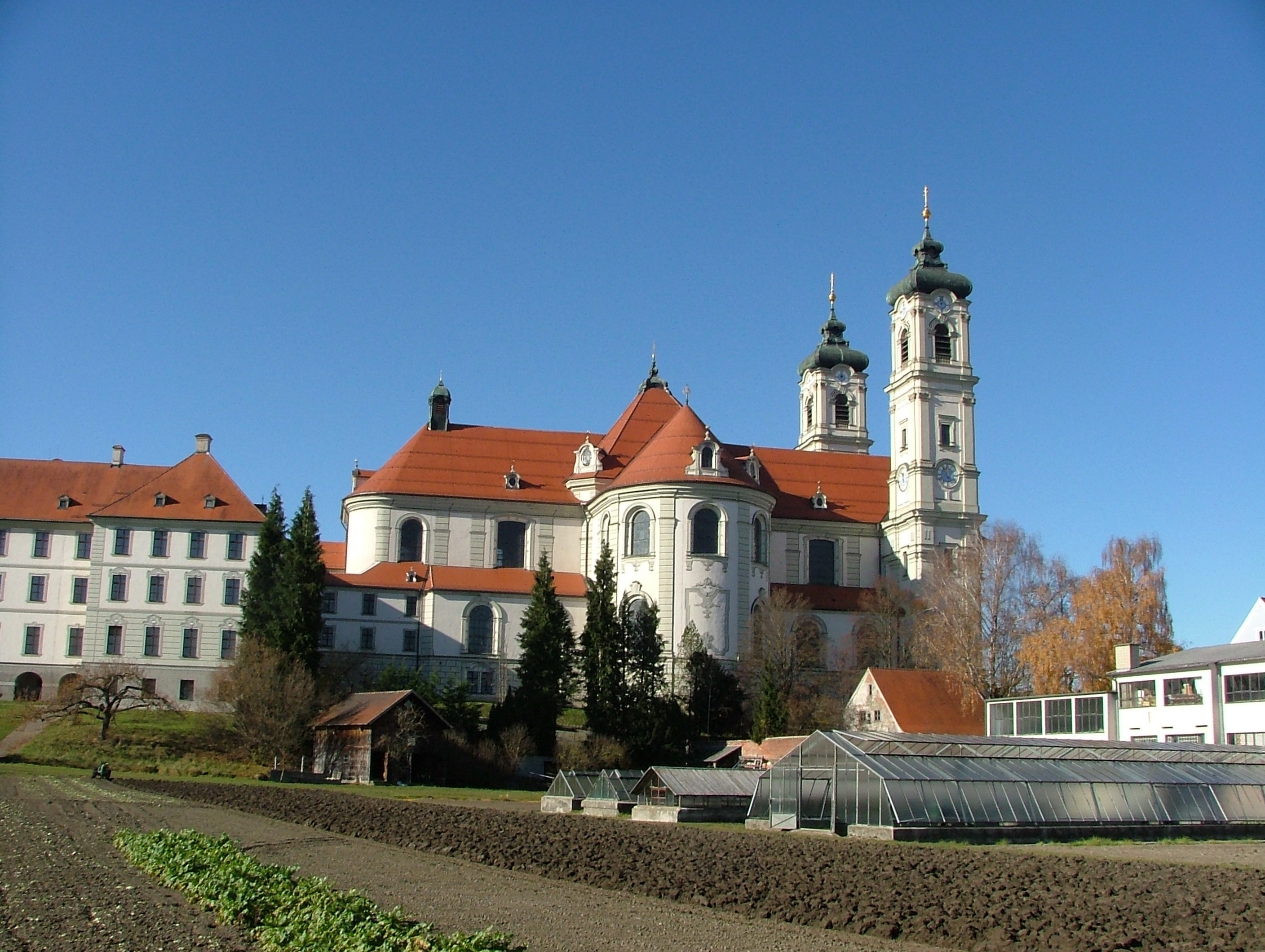 Klostergarten Ottobeuren